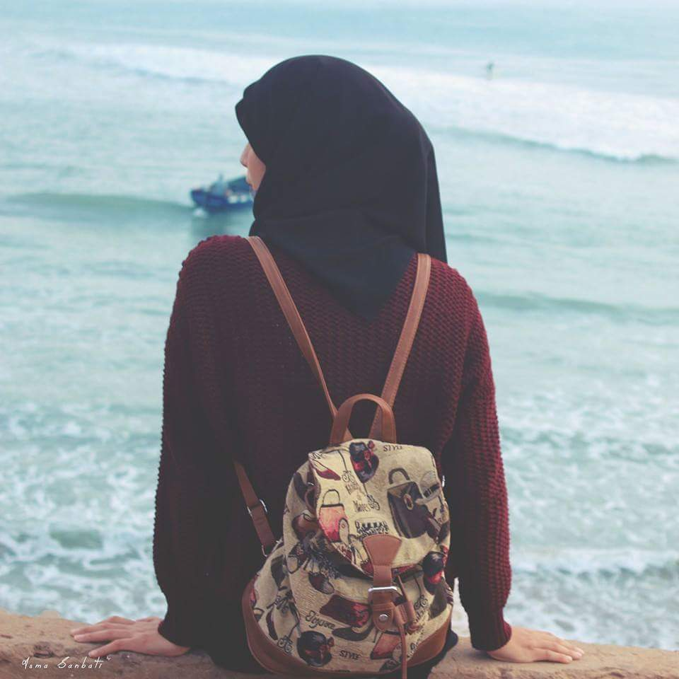 Maġribi: Hijab universe